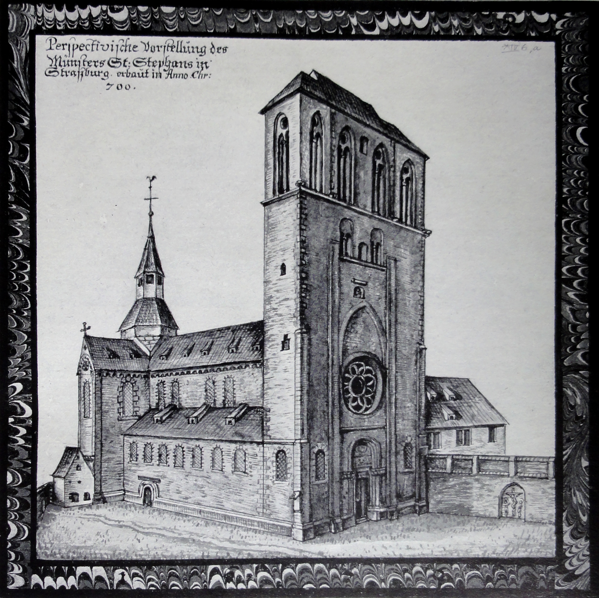 Alsace, Bas-Rhin, Vues historiques de Strasbourg, Eglise Saint-Etienne au XVIIe, Aquarelle de Arhardt